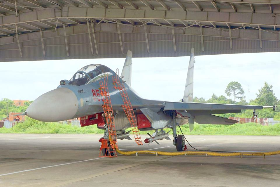 Tiêm kích Su-30MK2